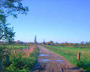 Rieselfelder in Gatow